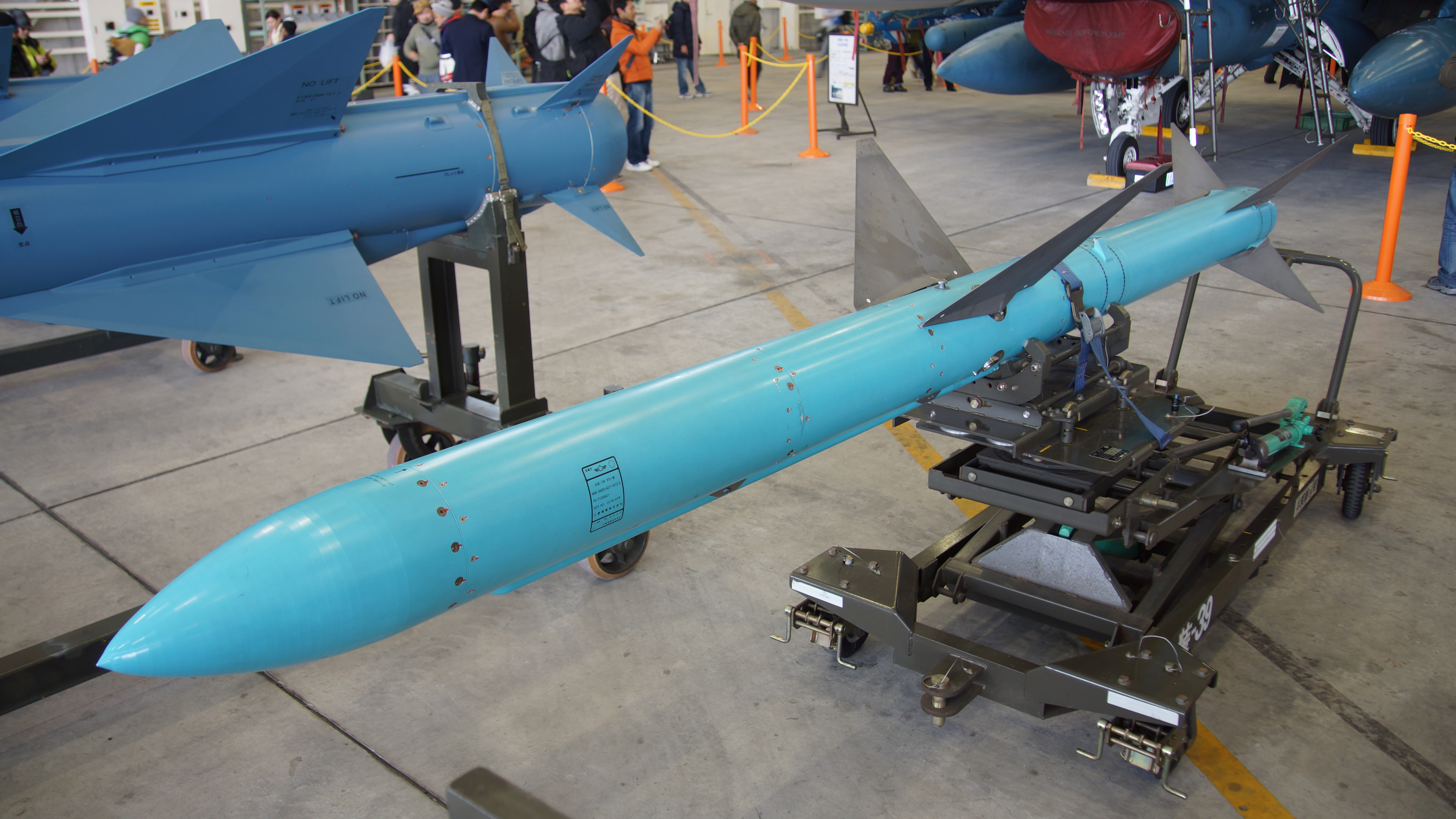 航空自衛隊 AIM-7Mスパロー空対空レーダーミサイル 左前面。2017年11月26日 築城基地にて。